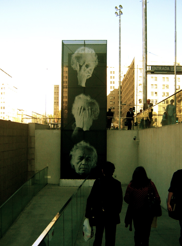 Exposición del poeta chileno Nicanor Parra, en el Centro Cultural Palacio de la Moneda.